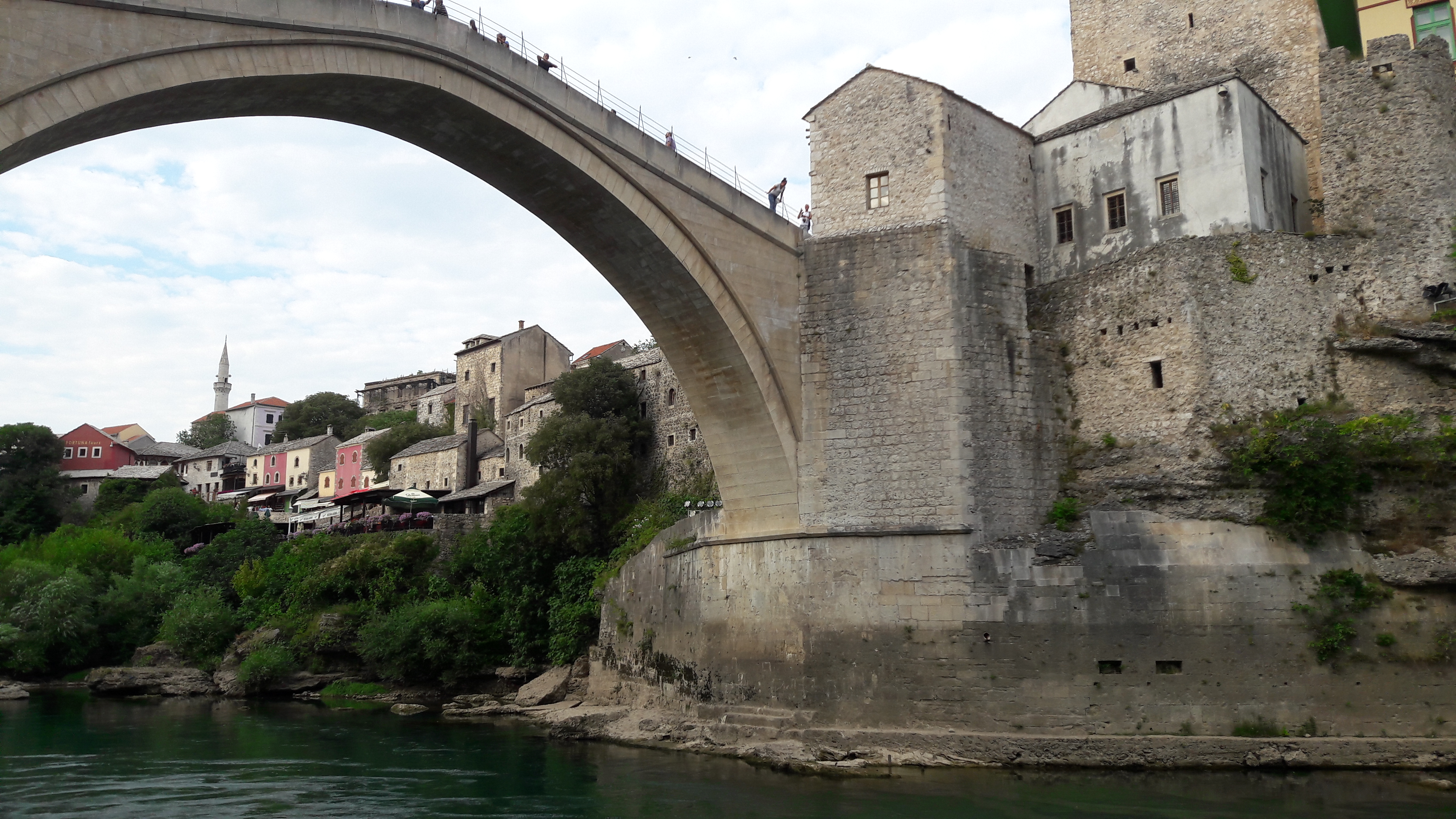 Ura që lidh të dy pjesët e Mostarit, mbi lumin Neretva